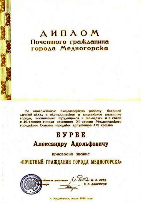 Диплом почётного гражданина города Медногорска (А. А. Бурба, март 1979).